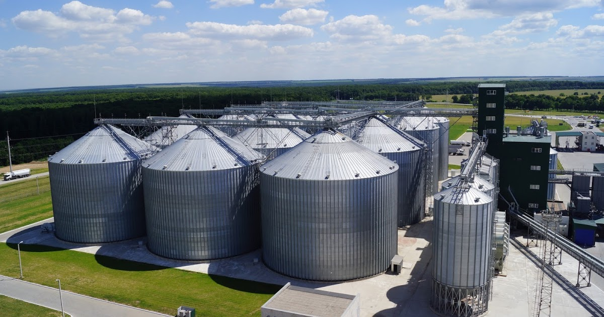 Силосы Symaga